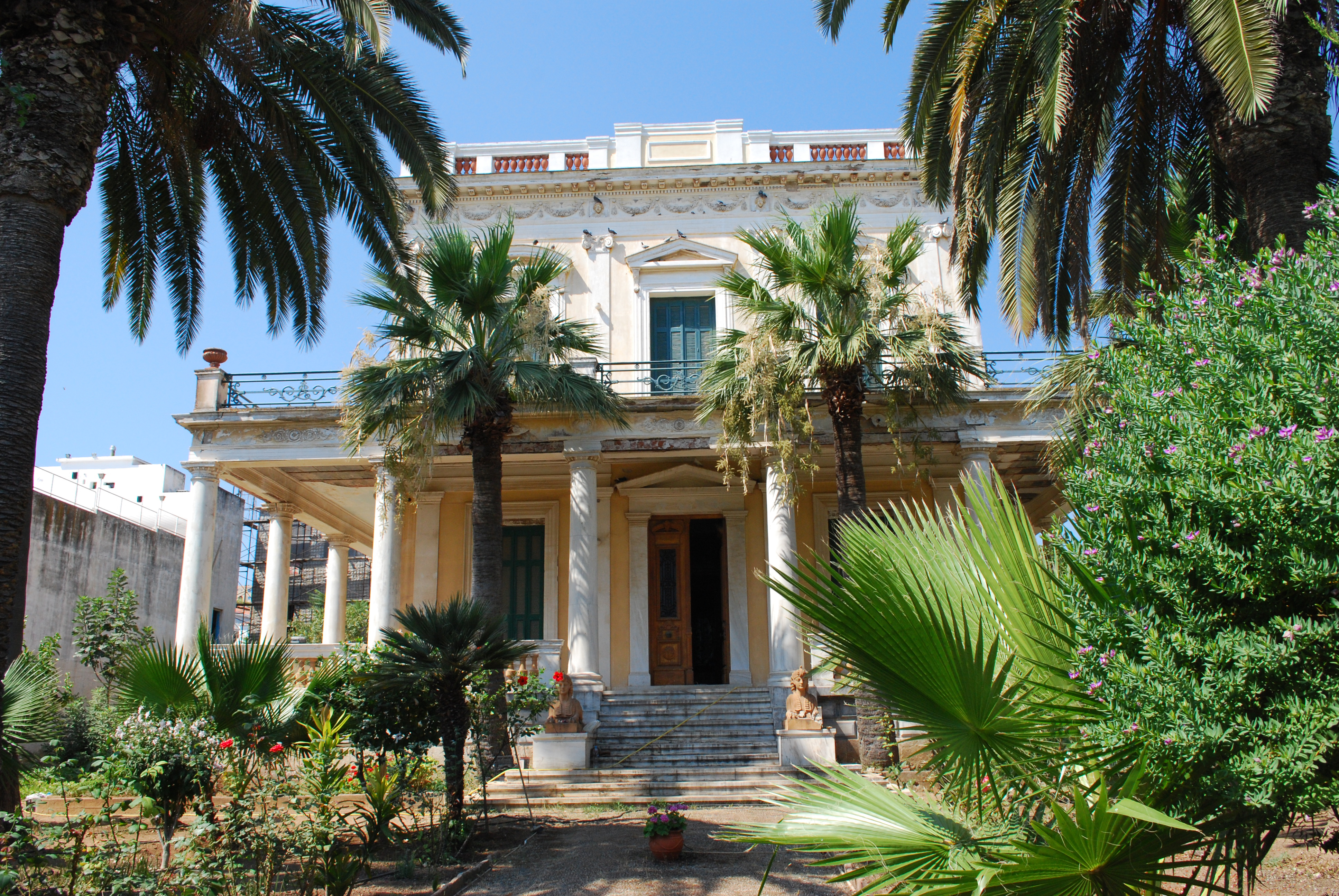 Spetses.